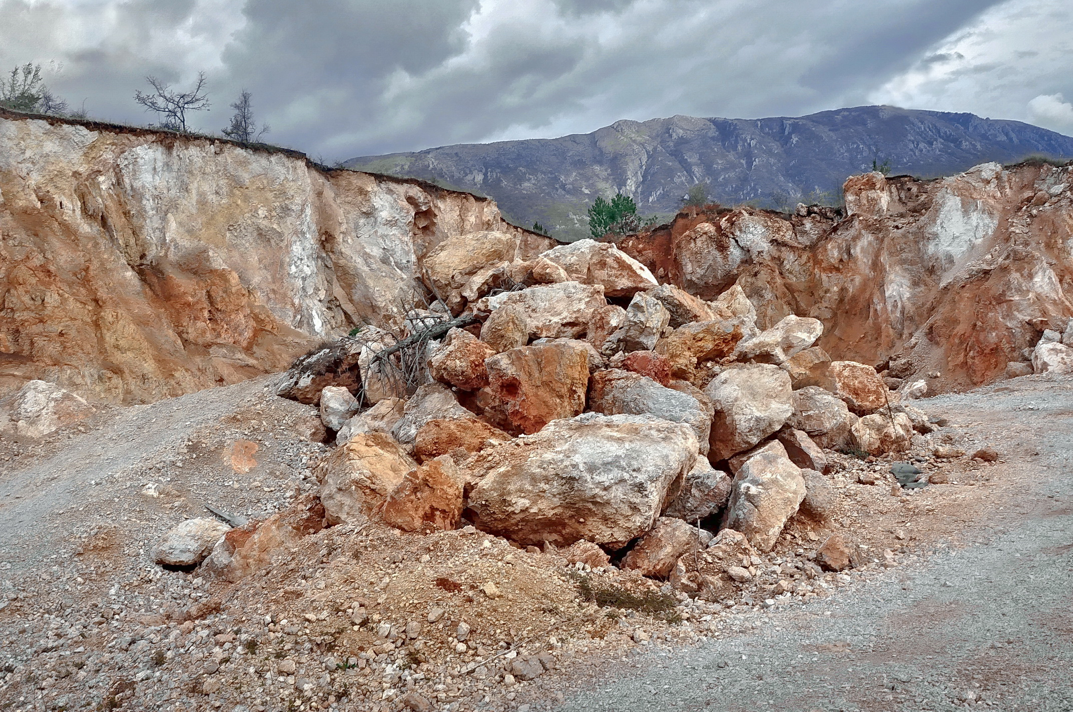 Srpski (latinica): Eksploatacija krečnjaka namenjenog za proizvodnju kreča u poljskim krečanama u s. Kaletinac na Suvoj planini. Srbija